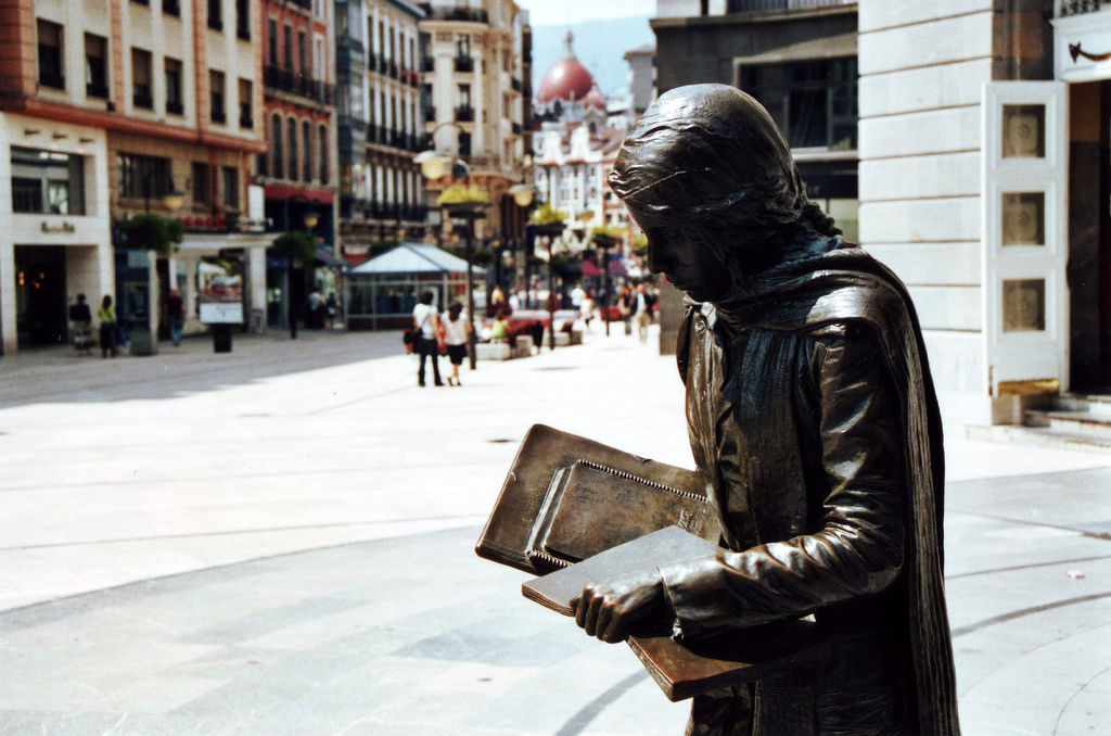 Enfrente del teatro Campoamor. Calle Pelayo. Representa a una estudiante que camina distraídamente leyendo un libro mientras sujeta una libreta y una carpeta. La estatua se llama "Esperanza Caminando" y es de Julio López Hernández (1998). Tomada con una Canon T50 y escaneada.